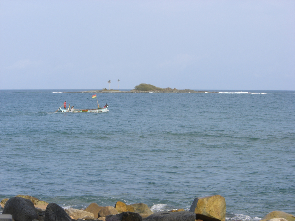 Strand bei Busua, Western Region, Ghana.